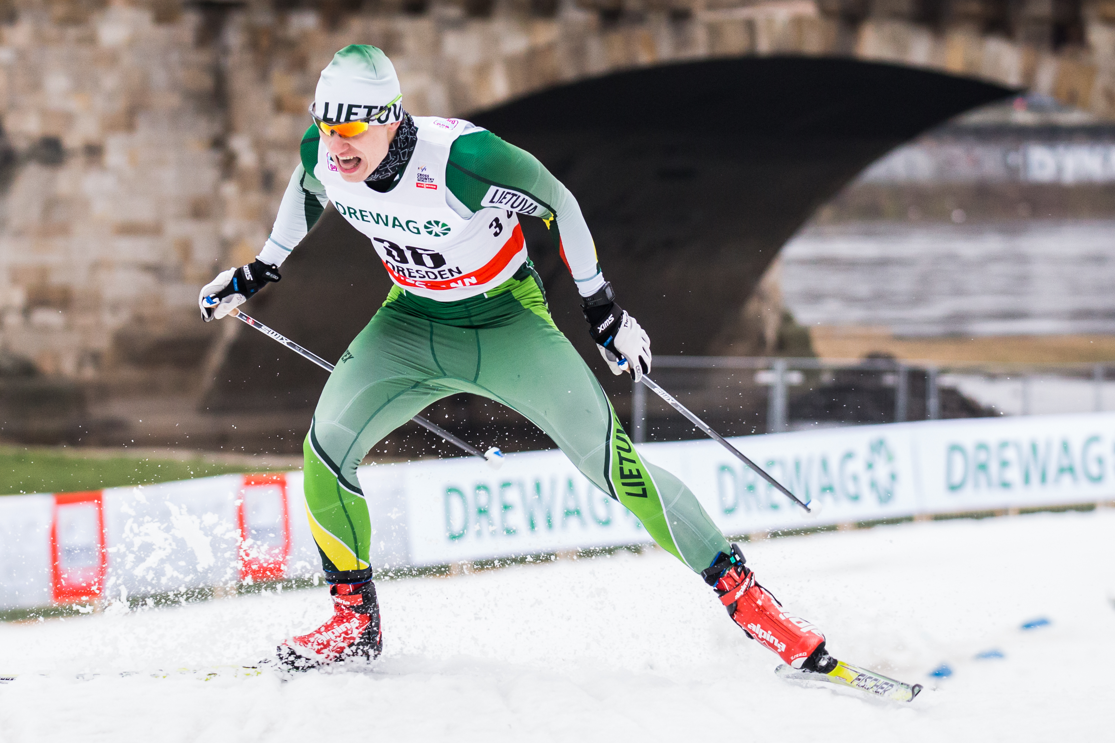 Modestas Vaiciulis (LTU, Litauen)